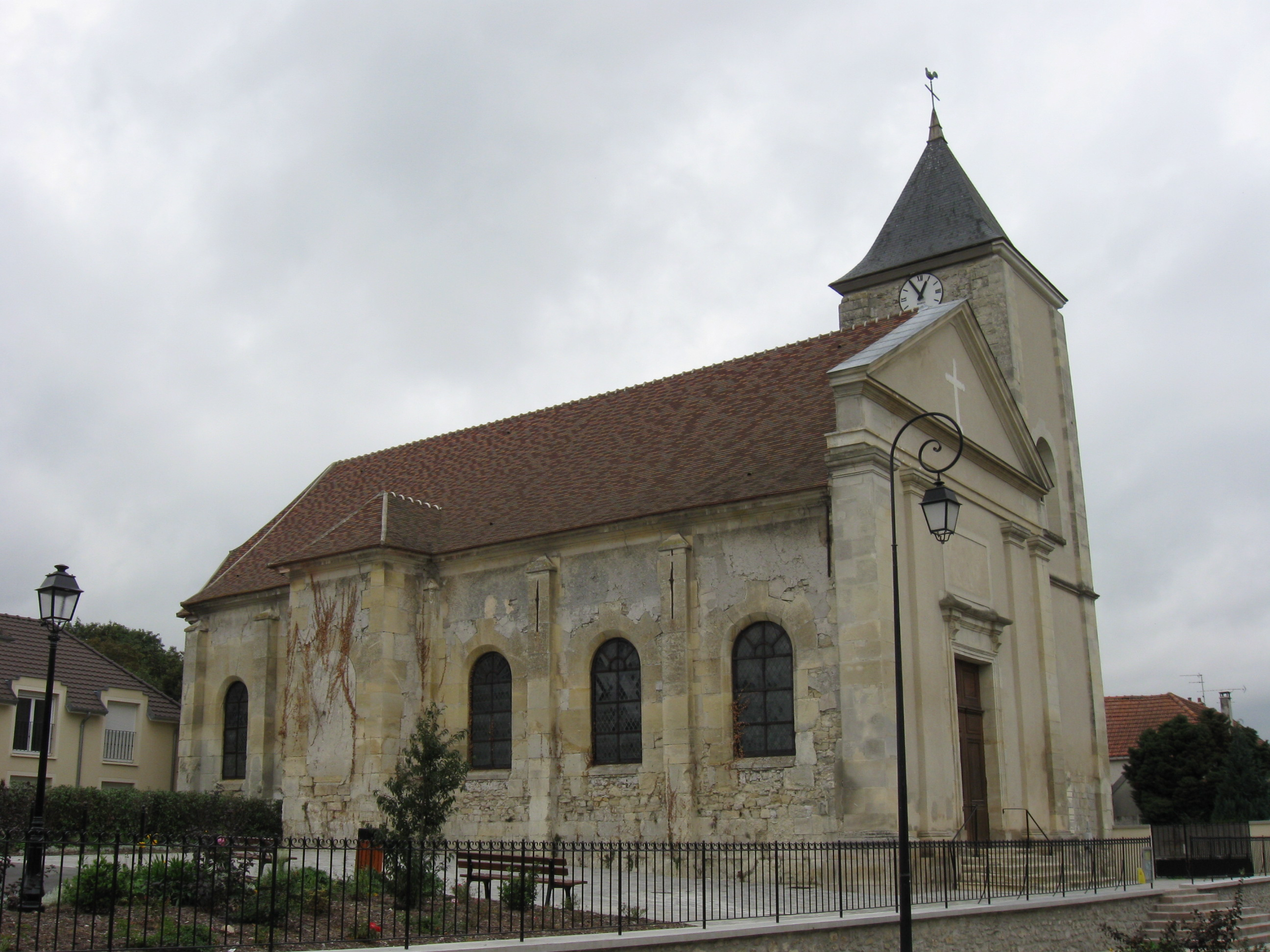 Église Notre-Dame-de-l’Assomption de Compans. (département de la Seine-et-Marne, région Île-de-France).